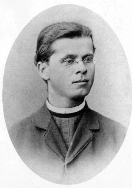 Simon Gregorčič, slovenski pesnik. Simon Gregorčič, Slovenian poet.